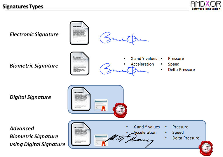 Монгол: Тоон гарын үсгийн түүх